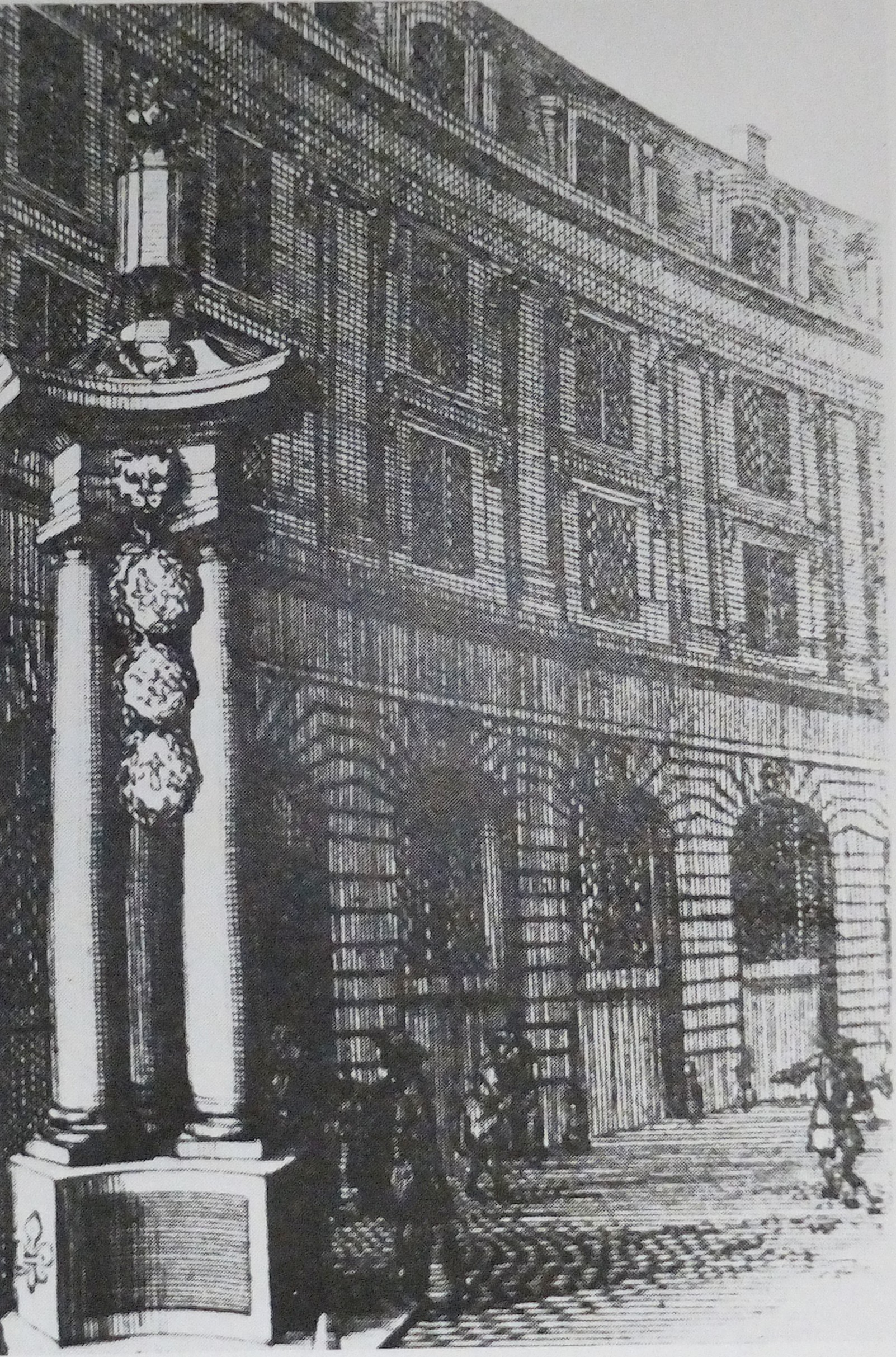 Un des quatres fanaux sur la place des Victoires (Paris, 2e arrond). Détruit en 1718. Détail d'une gravure de Nicolas Guérard (1648-1719).